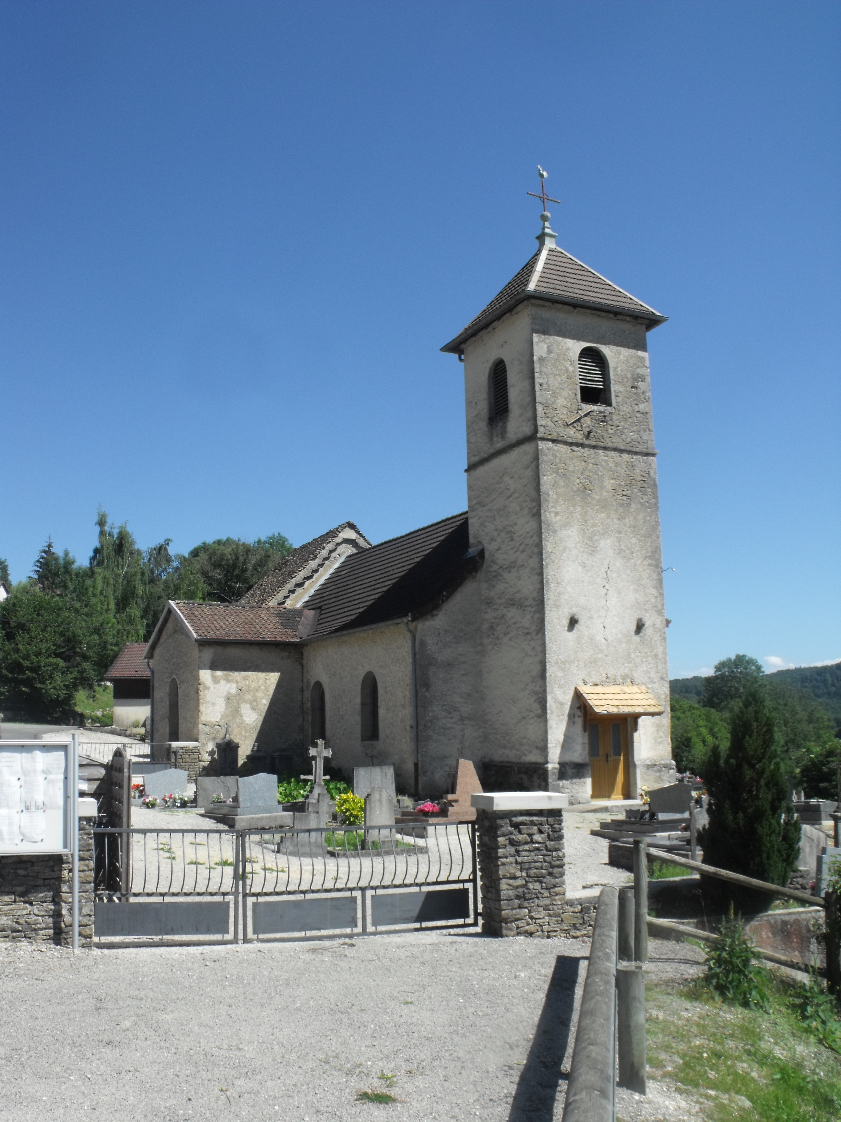 Eglise de Solemont, Doubs, France